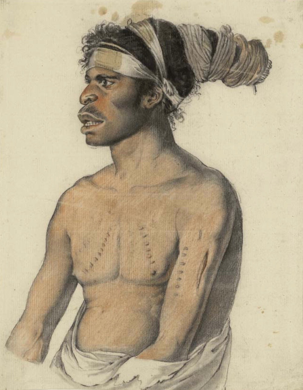 Nicolas-Martin Petit (1777–1804), Teilnehmer der Baudin-Expedition nach Australien (1800–1804): Cour-Rou-Bari-Gal, junger Aborigine, Neuholland (Australien). Muséum d’histoire naturelle du Havre. Vgl. Charles-Alexandre Lesueur, Nicolas-Martin Petit: Voyage de découvertes aux terres australes (…) Atlas, (1. Teil, Paris) ohne Jahr, Figur XVIII.